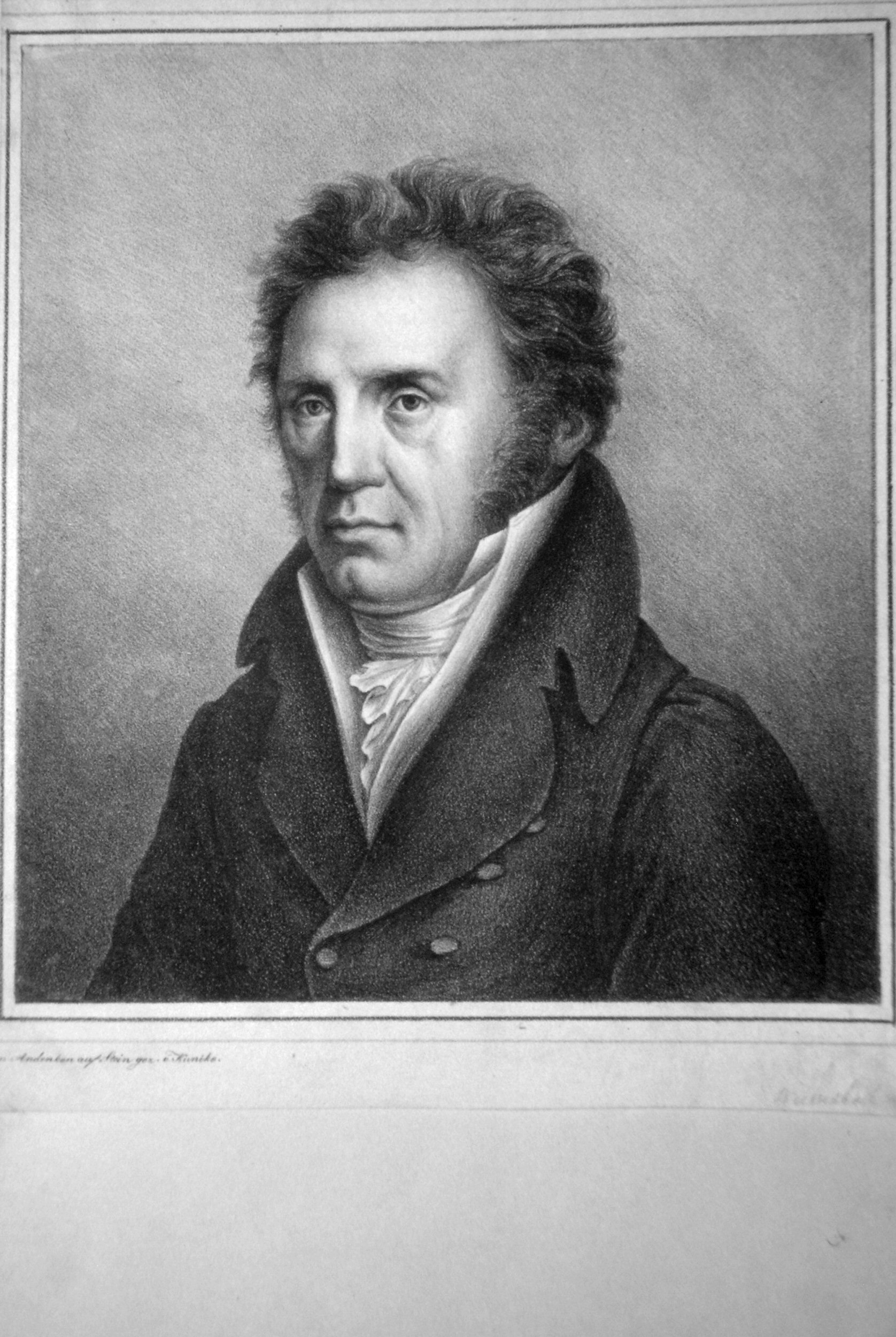 Alois Weissenbach (1766-1821) Arzt. Lyriker. Lithographie von Adolph Friedrich Kunike, um 1830